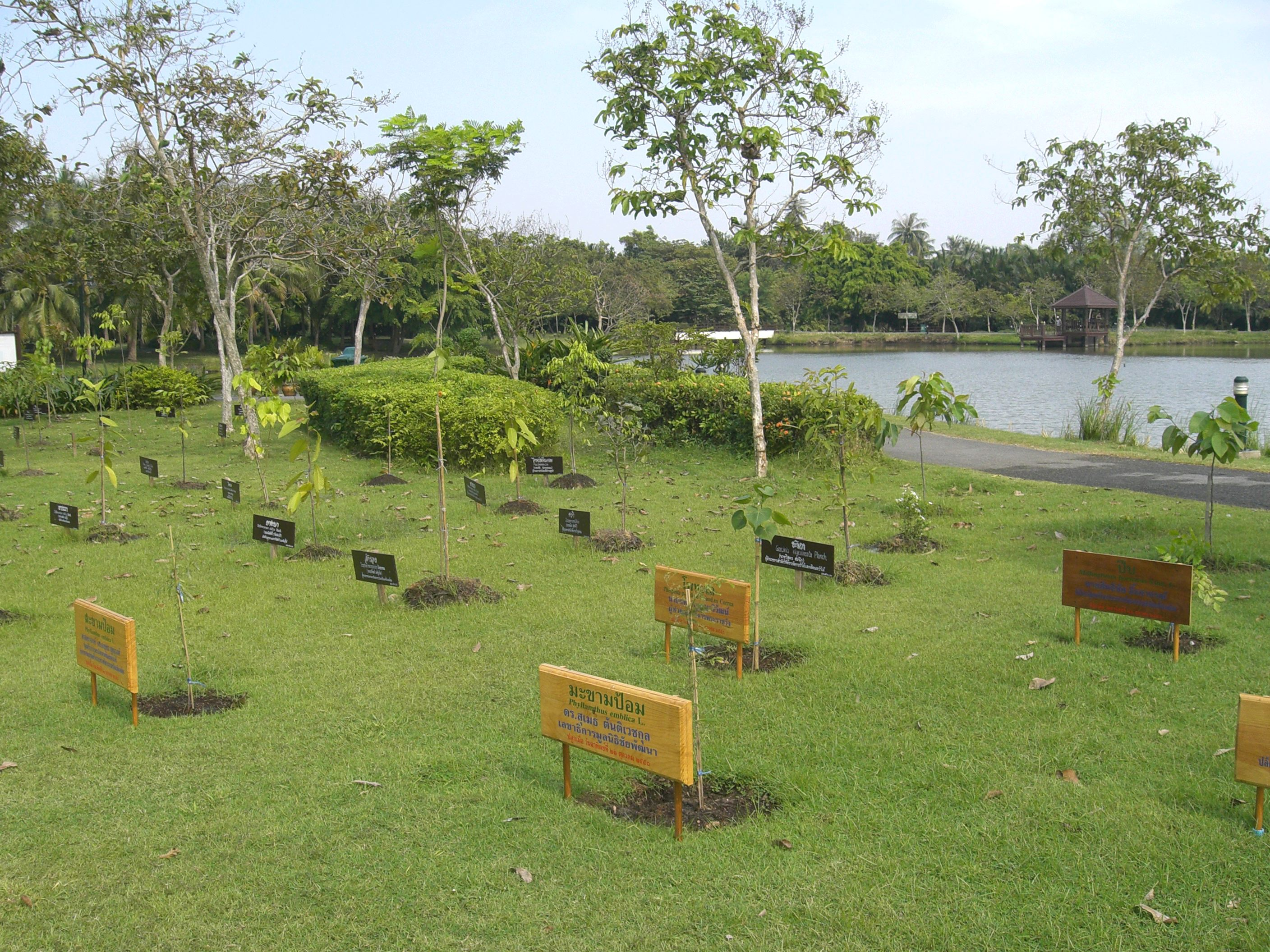 Park Suan Sri Nakhon Khuenkhan in Phra Pradaeng, Thailand